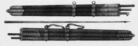 Джиды (джириты, джириды)